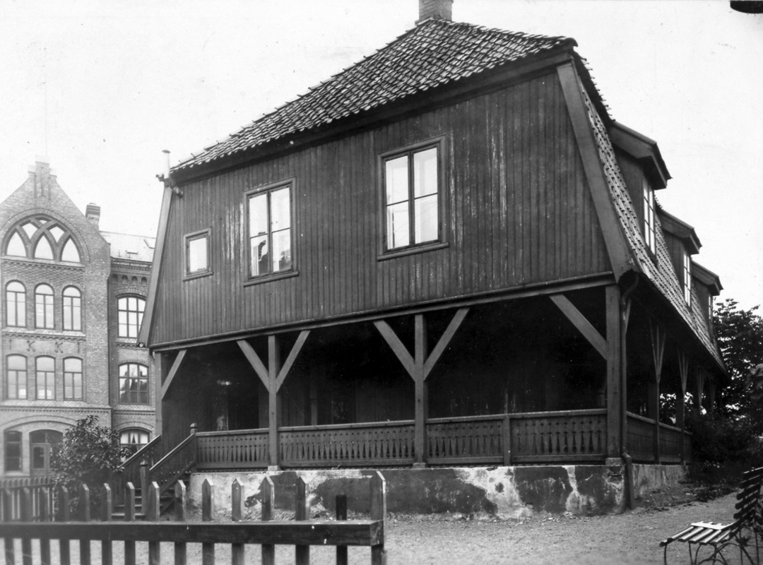 Overlærerboligen ved Foss skole, revet 1908